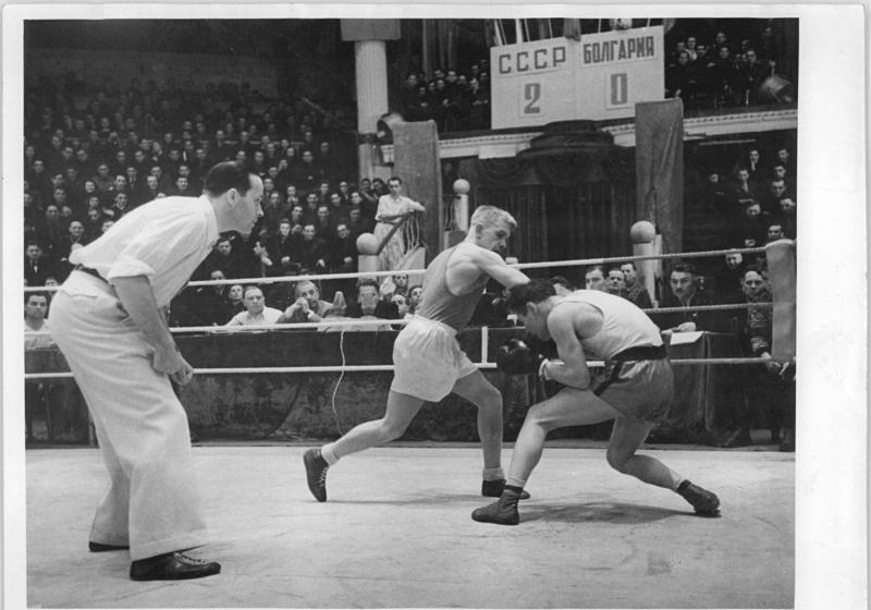 A. Sasuchin, I. Gjurjew Zentralbild XIII 6.5.1952 Internationales Länderturnier der Amateurboxer in Moskau vom 7.-15.März 1952. Im Moskauer Staatlichen Zirkus fanden die internationalen Freundschaftswettkämpfe von Amateurboxern aus 7 Ländern statt. Im Ring trafen sich die Mannschaften der UdSSR, der CSR, Ungarns, Bulgarien, Polens, Rumäniens und der Deutschen Demokratischen Republik. UBz: Boxkampf der Federgewichtler A. Sasuchin (UdSSR) und I. Gjurjew (Bulgarien), in dem Sasuchin den Sieg erreng.